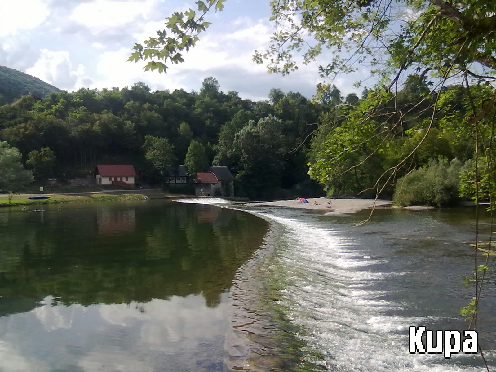 D3 8a, 47251, Pribanjci, Croatia